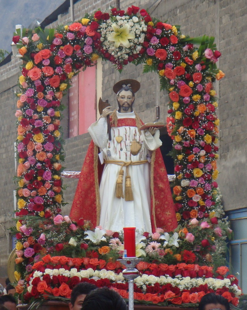 San Matías Aposto, en Cuijingo